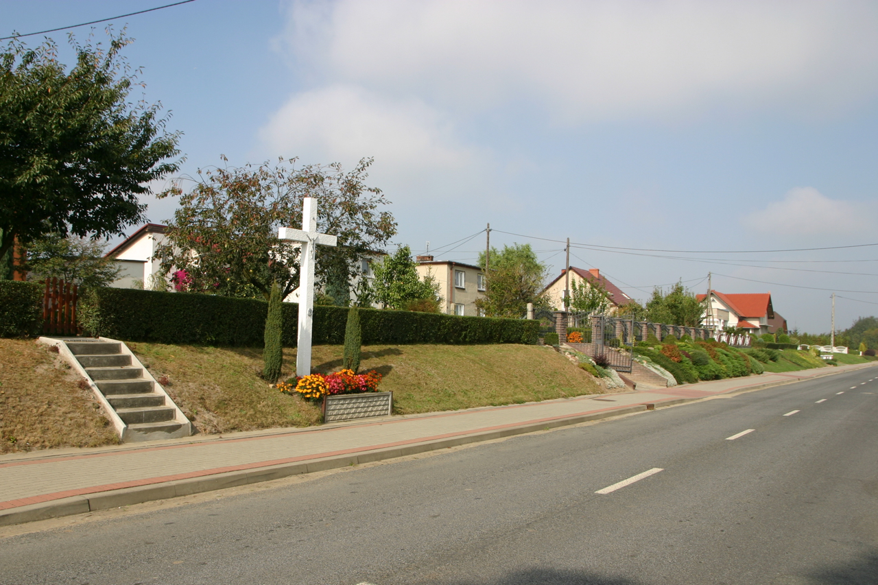 Poborszów (dodatkowa nazwa w j. niem. Poborschau) – wieś w Polsce położona w województwie opolskim, w powiecie kędzierzyńsko-kozielskim, w gminie Reńska Wieś.